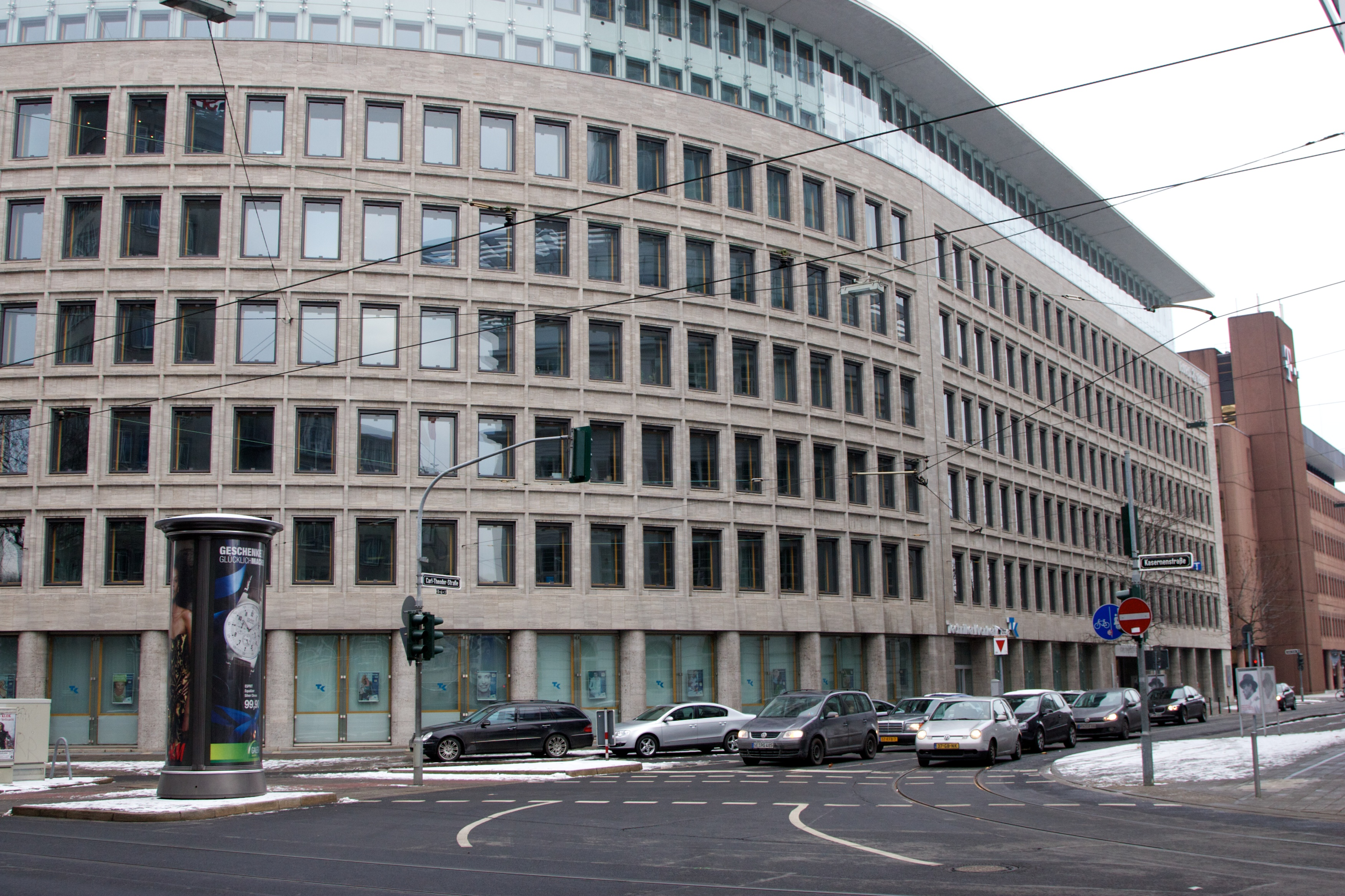 Kasernenstraße 40, Düsseldorf in Richtung Carl-Theodor-Strasse